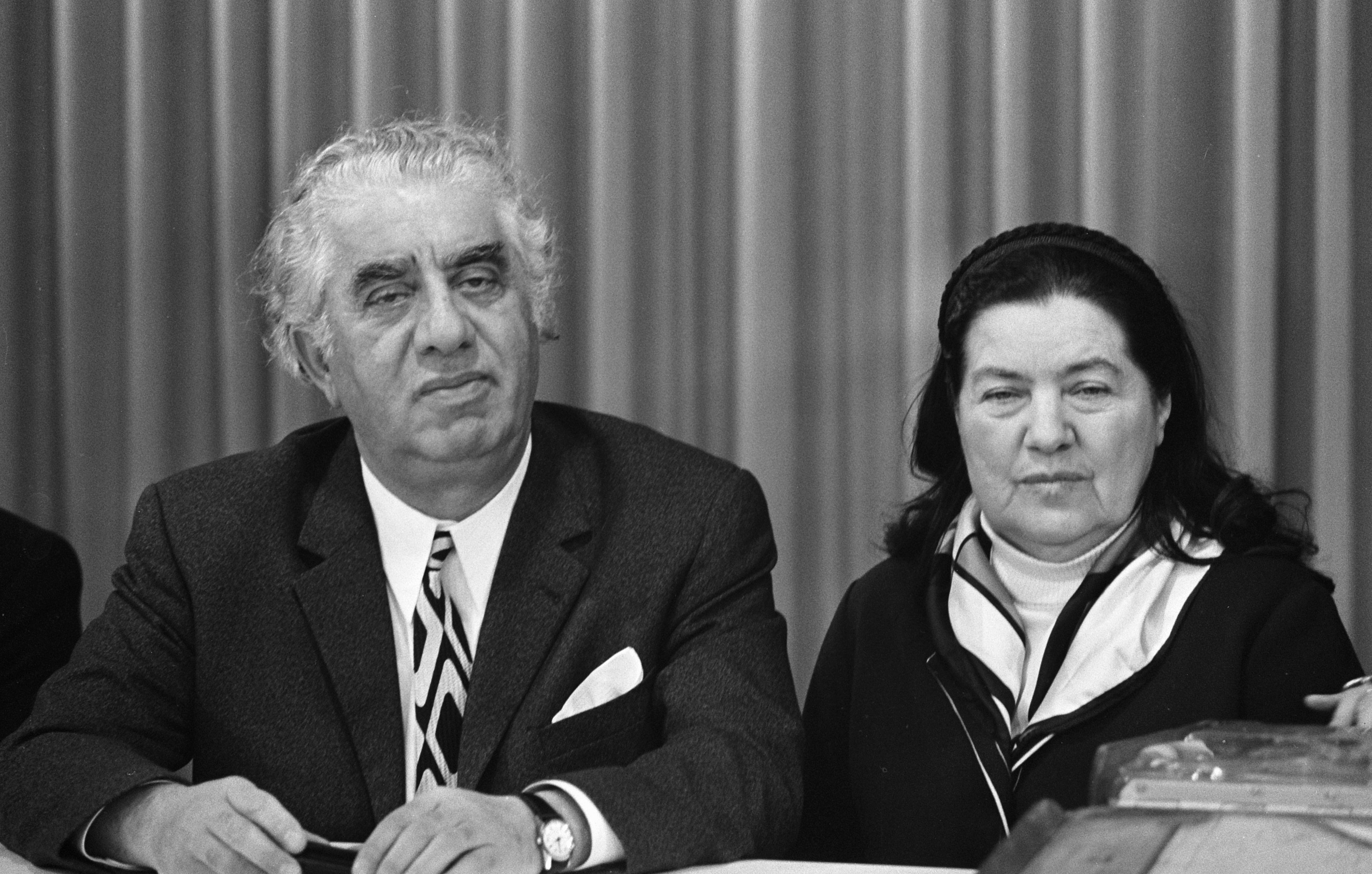 Russische componist Chatsjaturian arriveert op Schiphol